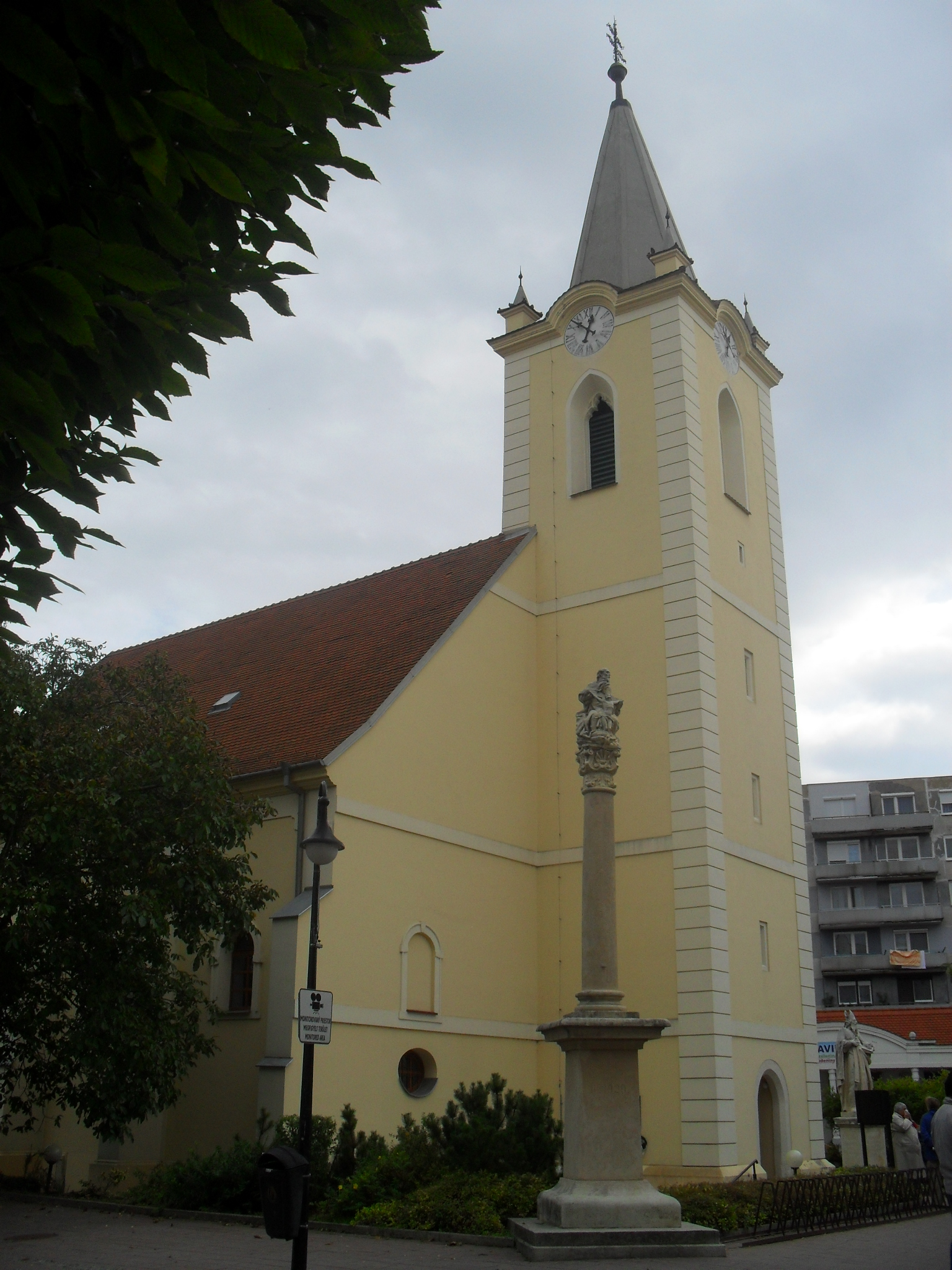 Dunaszerdahely - katolikus templomSlovenčina: Farský kostol nanebovzatia Panny Márie a socha sv. Trojice v Dunajskej Strede